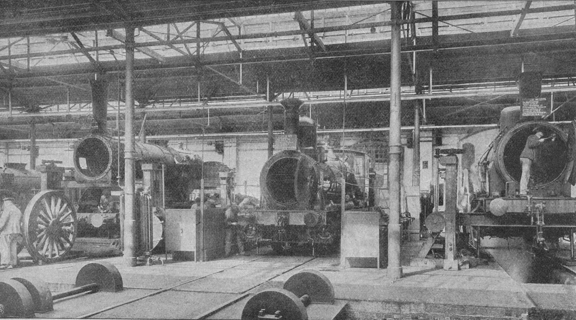 Bild aus Aufsatz: Im Reich des roten Zettels. Ein Gang durch die Reparaturwerkstatt der Eisenbahn.